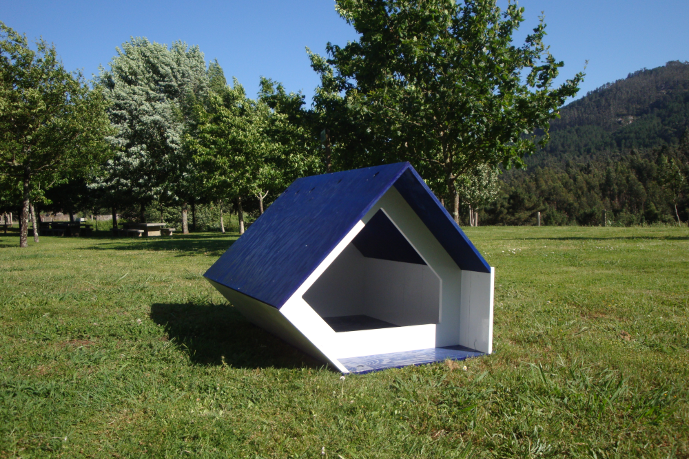 Caseta para perros diseño Flip marca DogWizz talla grande